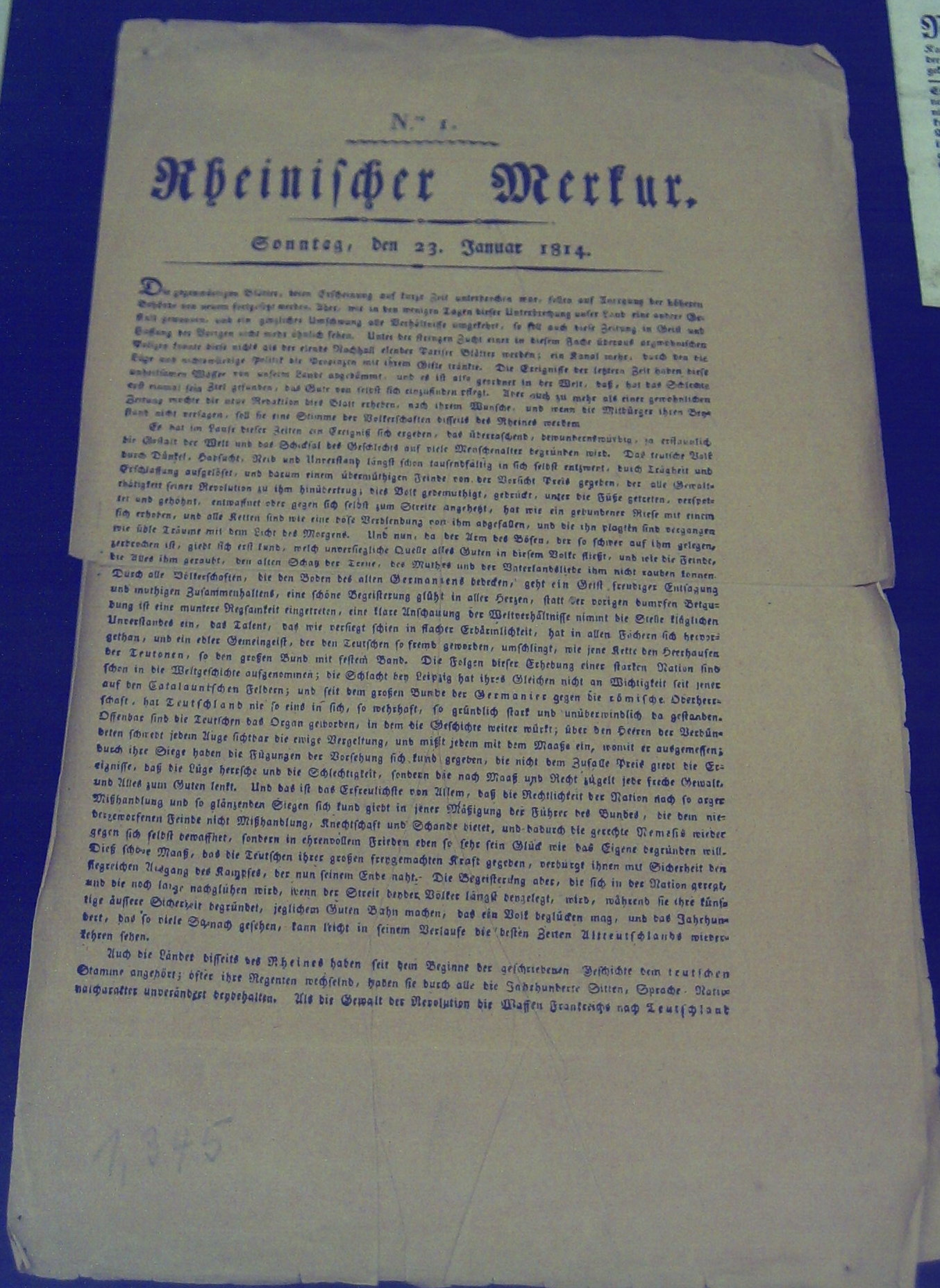 Erste Ausgabe des Rheinischen Merkur vom 23. Januar 1814. Ed. Joseph von Görres